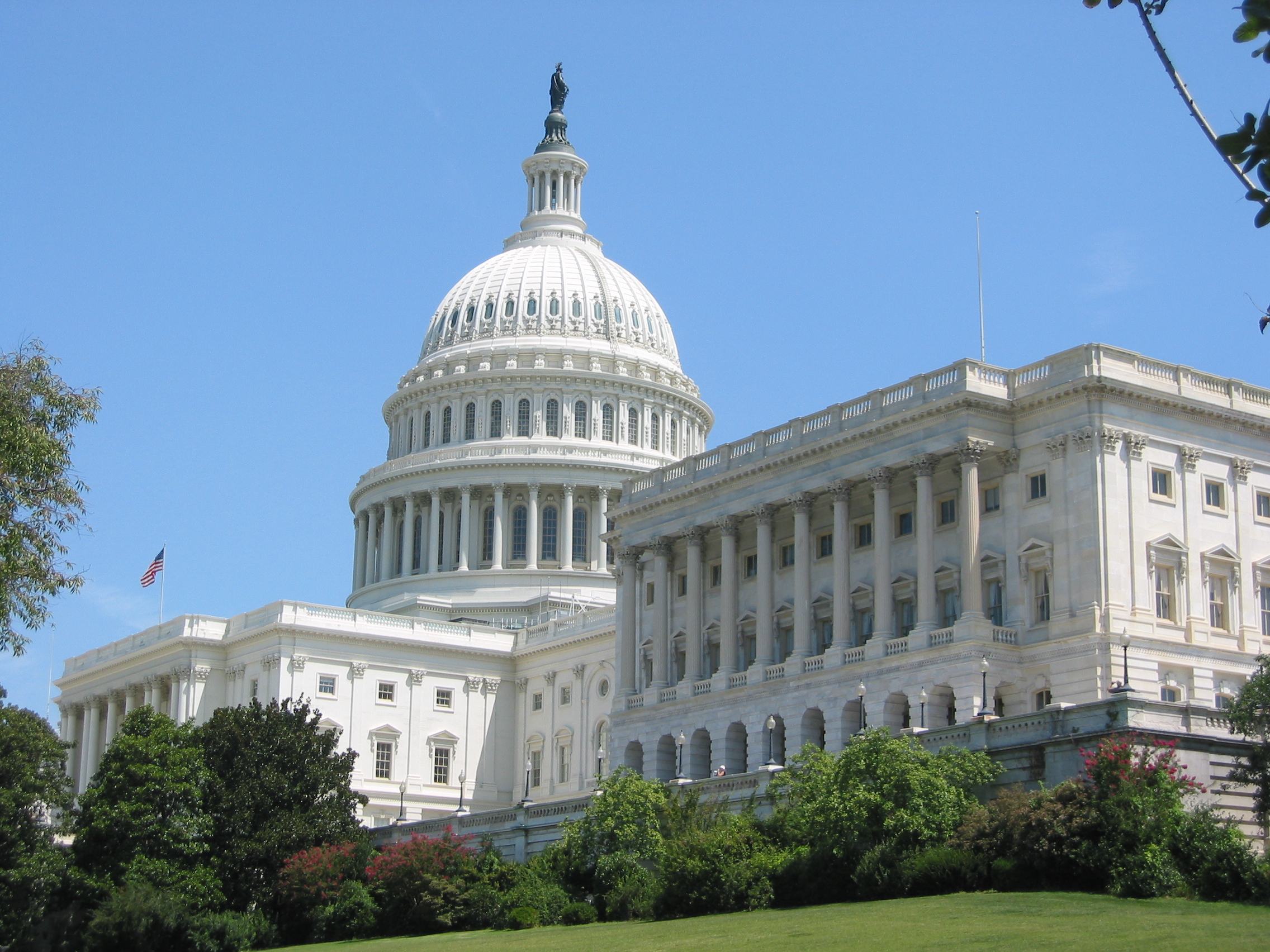 Capitol Building Side